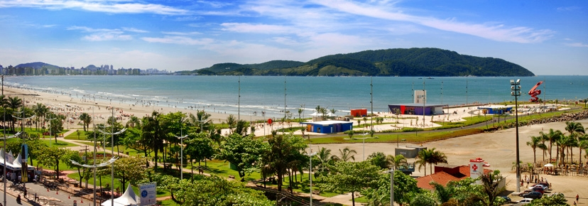 Atividades esportivas, lazer e recreação, esses são apenas alguns dos os atrativos do novo cartão postal da cidade de Santos, o parque Roberto Mário Santini, no emissário submarino da praia do José Menino.